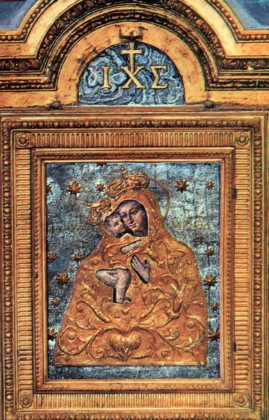 Цудатворная ікона Маці Божай Жыровіцкай Рымскай (Madonna del Pascuolo). Знаходзіцца: Sts. Sergius & Bacchus, parish church, museum and guest house Piazza Madonna dei Monti, 3 Via Serpentini 00184 Roma, Italia +3906 485 778